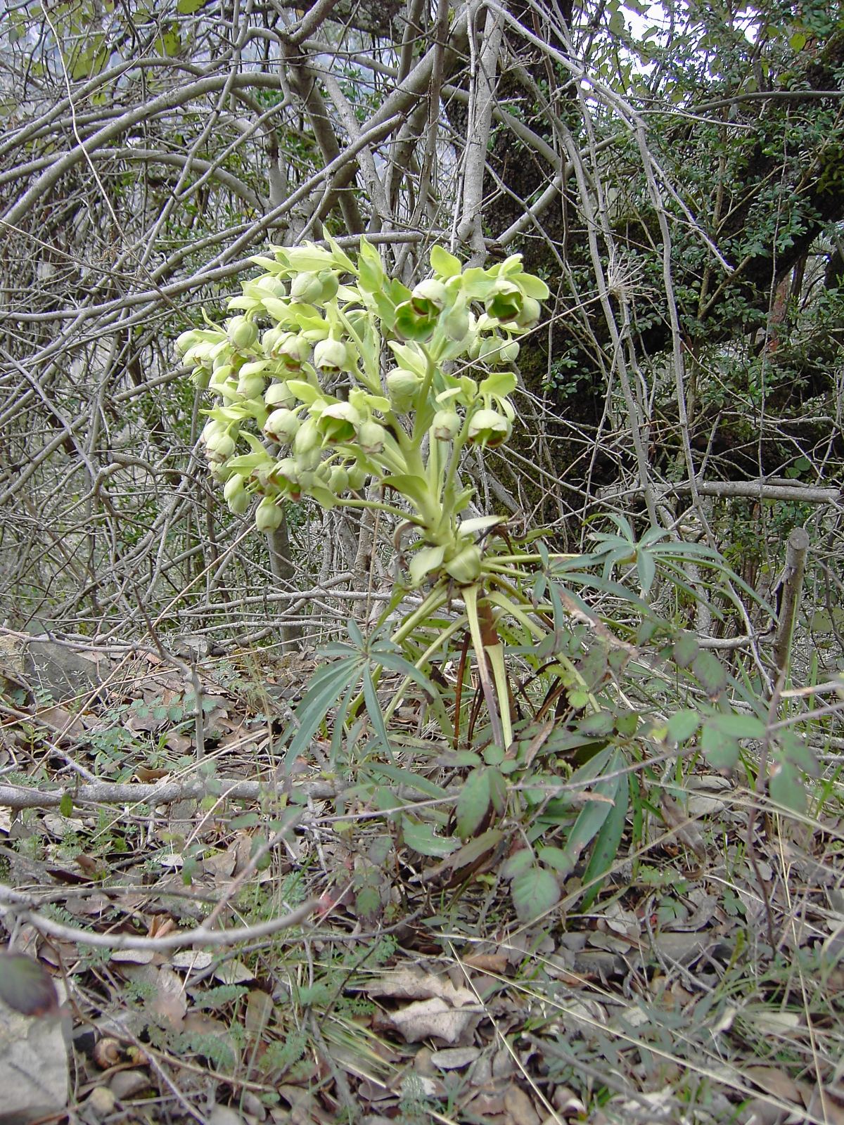 Floración del Ixarruego (Helleborus foetidus).